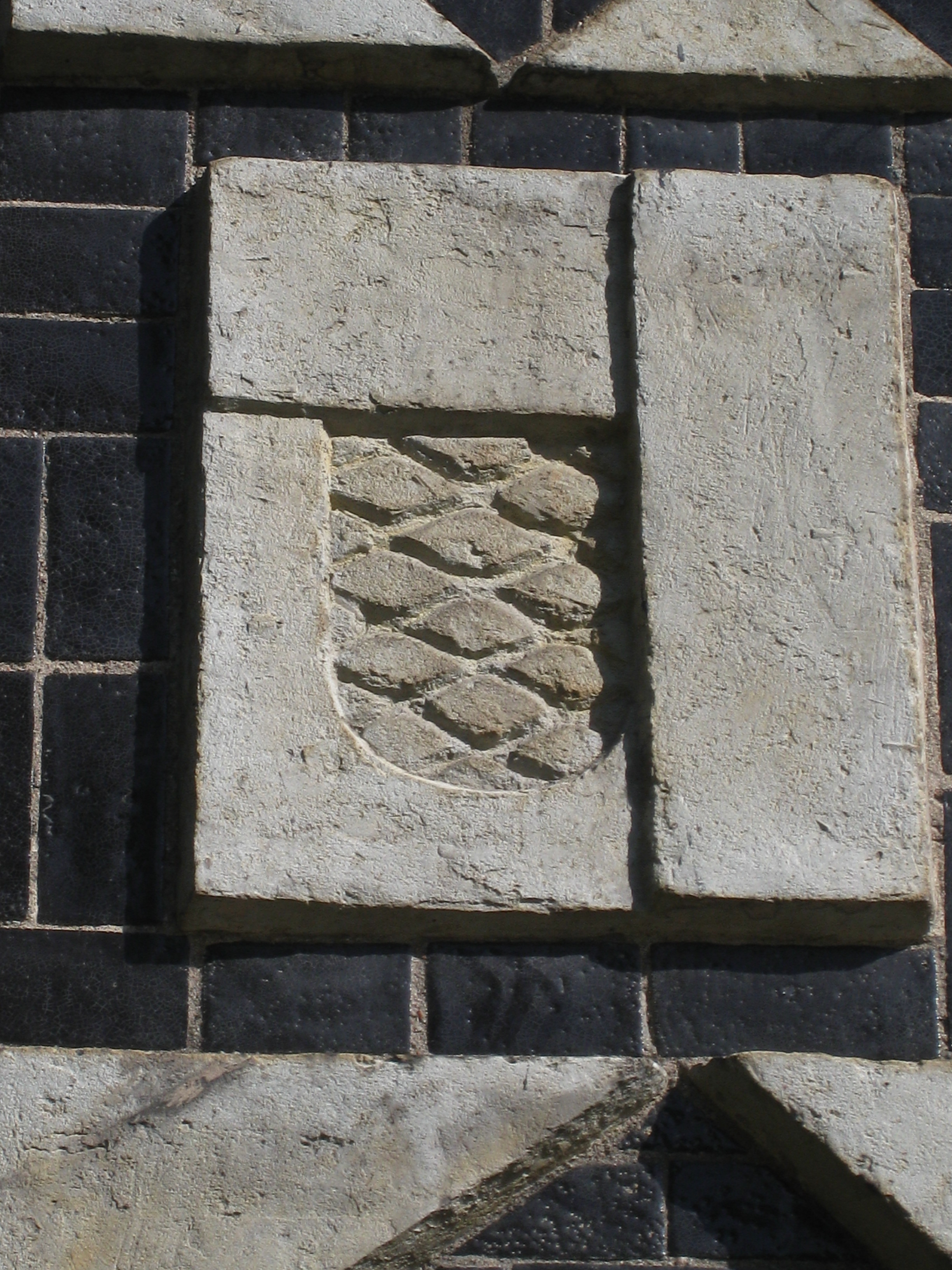 Blackebergs gymnasium, Wergelandsgatan 22, Blackeberg, Bromma, Stockholm. Detalj av stengodsreliefen, symbolen för skolan, en sköld med bergsilhuetter, av Elis Eriksson.